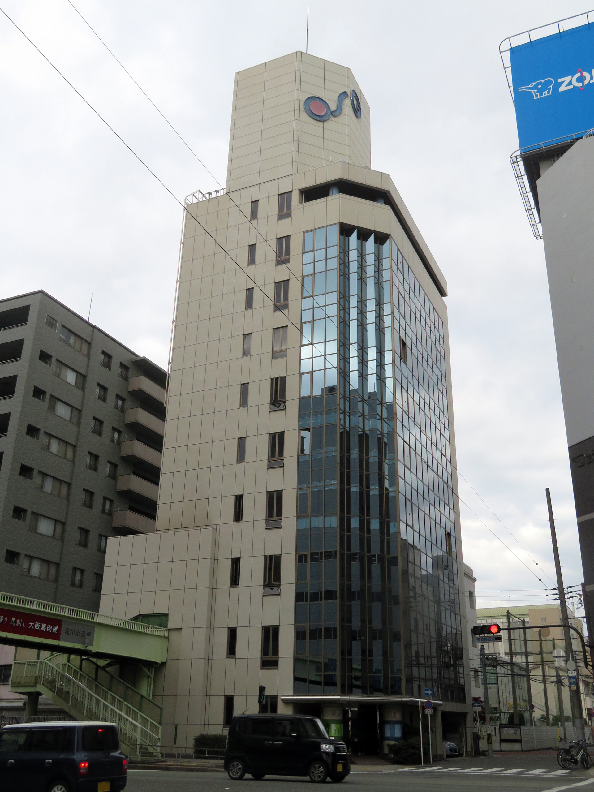 株式会社OSGコーポレーション本社を撮影。